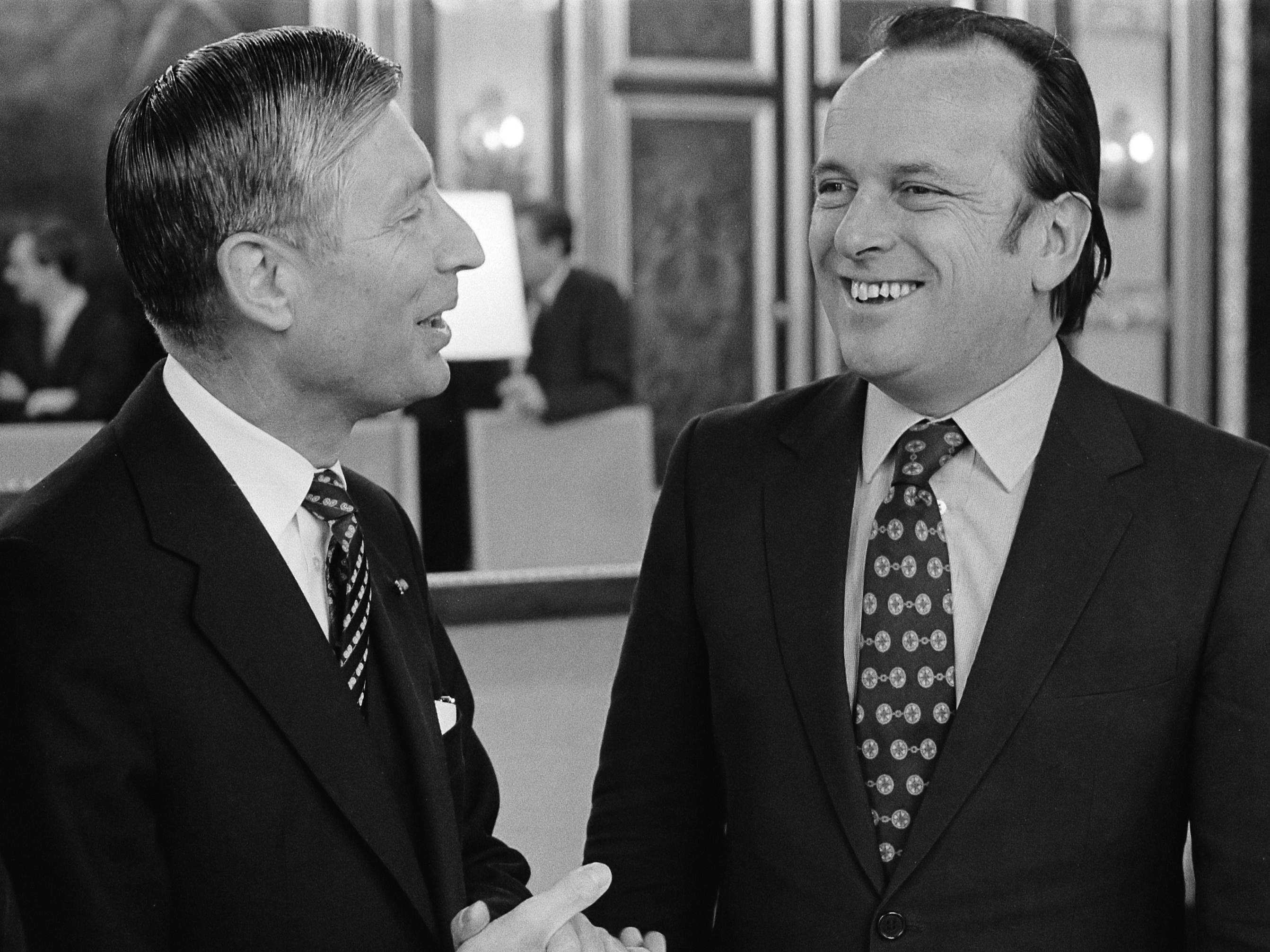 Van Agt ontving Portugese regeringsdelegatie onder leiding van Pinto Balsemao in Den Haag. Van Agt (l.) en Pinto Balsemao 25 februari 1982